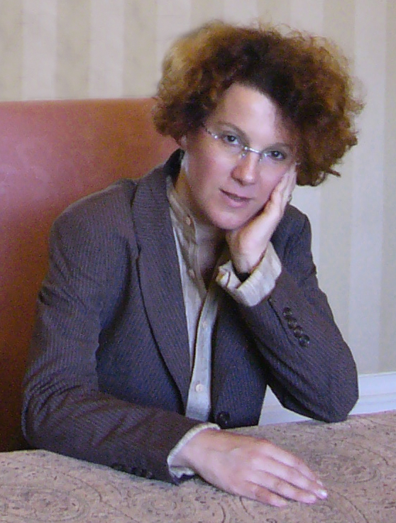 Tiziana Colusso